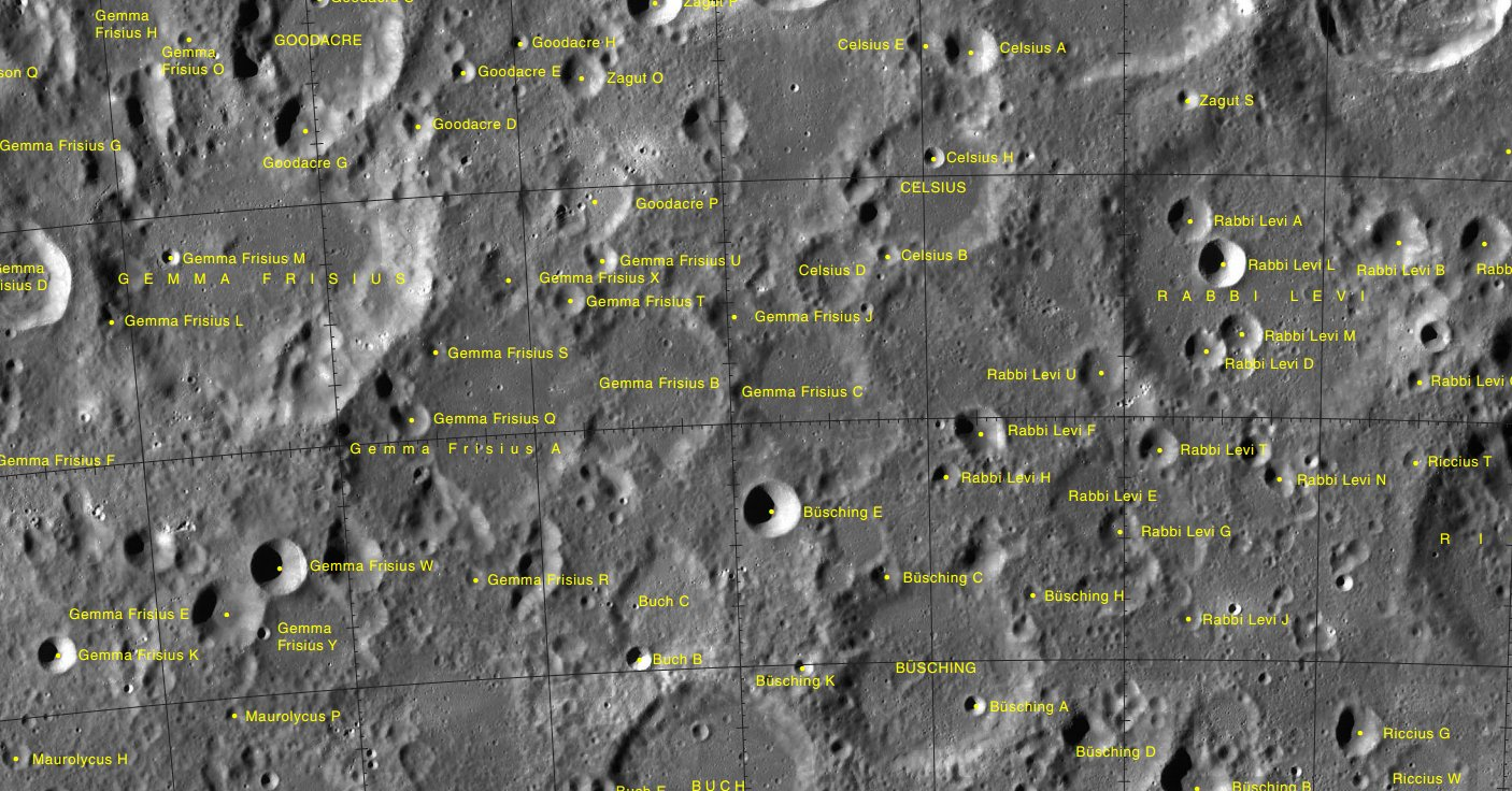 Cráter Celsius (LROC WAC-Lola)